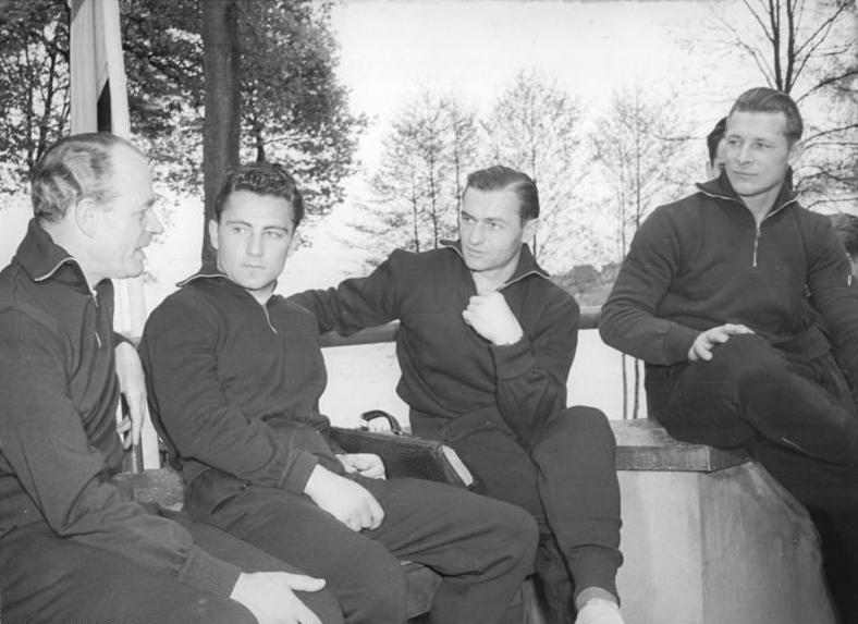 Zentralbild-Funck Bey-Ho. 9.5.1955 Berlins Fußballer im Trainingslager - Die gesamtberliner Fußballmannschaft weilt vom 9. bis 11. Mai 1955 in einem kurzen Trainingslager am Strausberger See. Sie bereitet sich dort auf das Städtespiel gegen Prag vor. UBz: Gespannt lauschen die Spieler den Worten ihres Trainers Sobek. Von links nach rechts: Sobek, Fritsche, Eilitz, Strechlow.